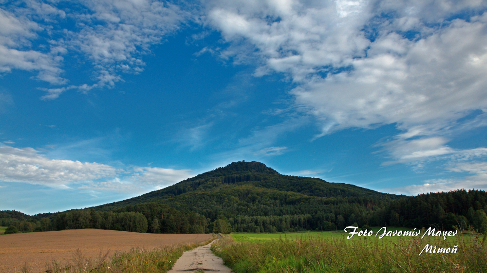 Ralsko - Noviny pod Ralskem 25 srpen 2012